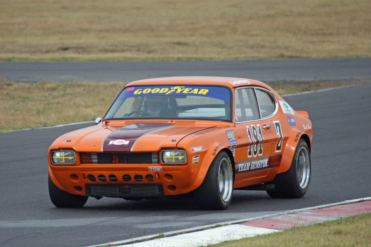 Gunston Perana beim Killarney Piper Day 2009